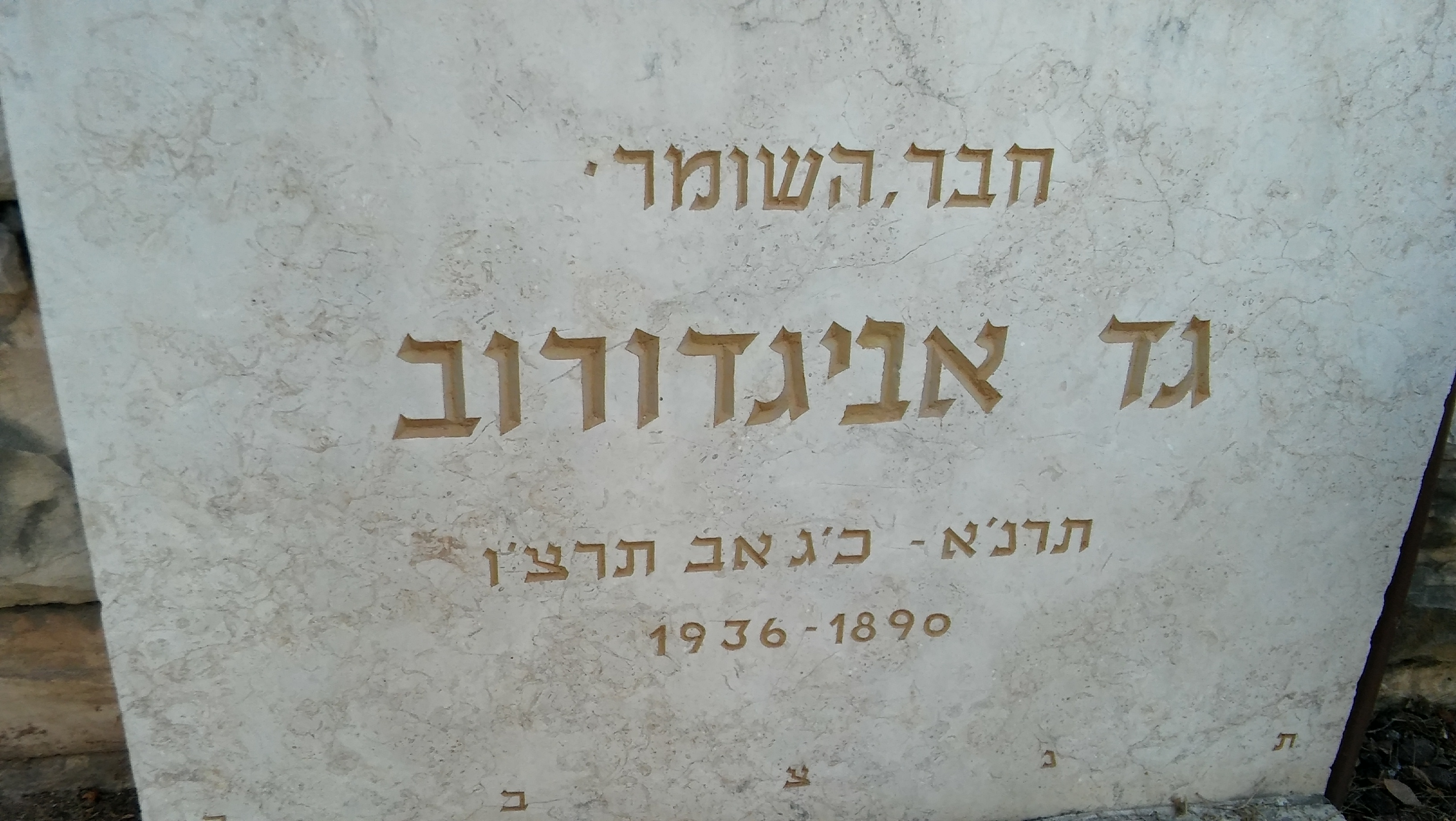 קברו של גד אביגדורוב - בית הקברות כפר גלעדי